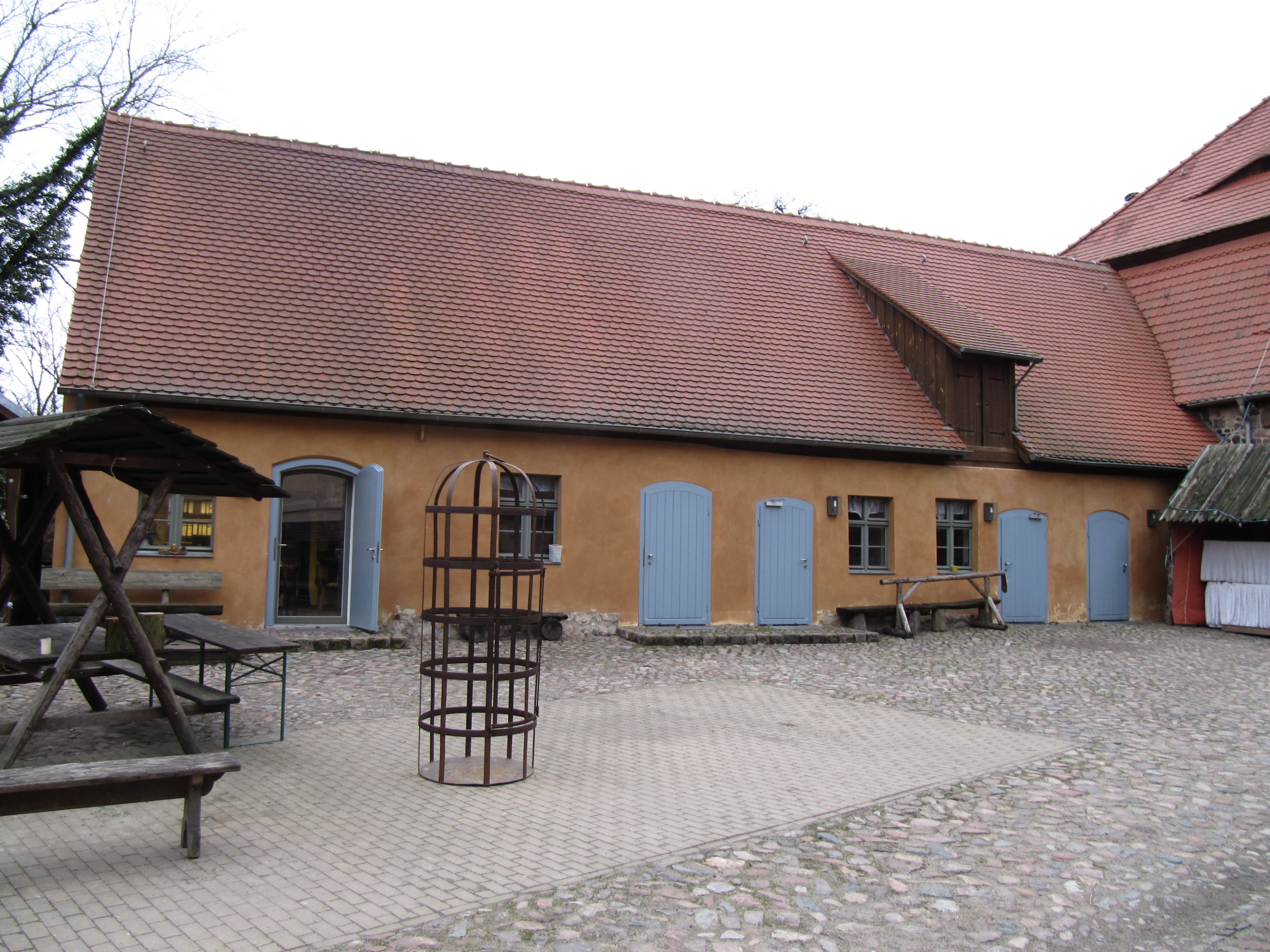 gebäude westen burghof rabenstein (fläming)